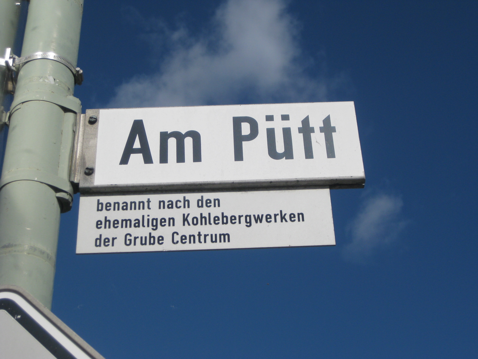 Straßenschild "Am Pütt" in Röthgen/Siedlung Jägerspfad in Eschweiler mit Bezug zum Eschweiler Bergbau